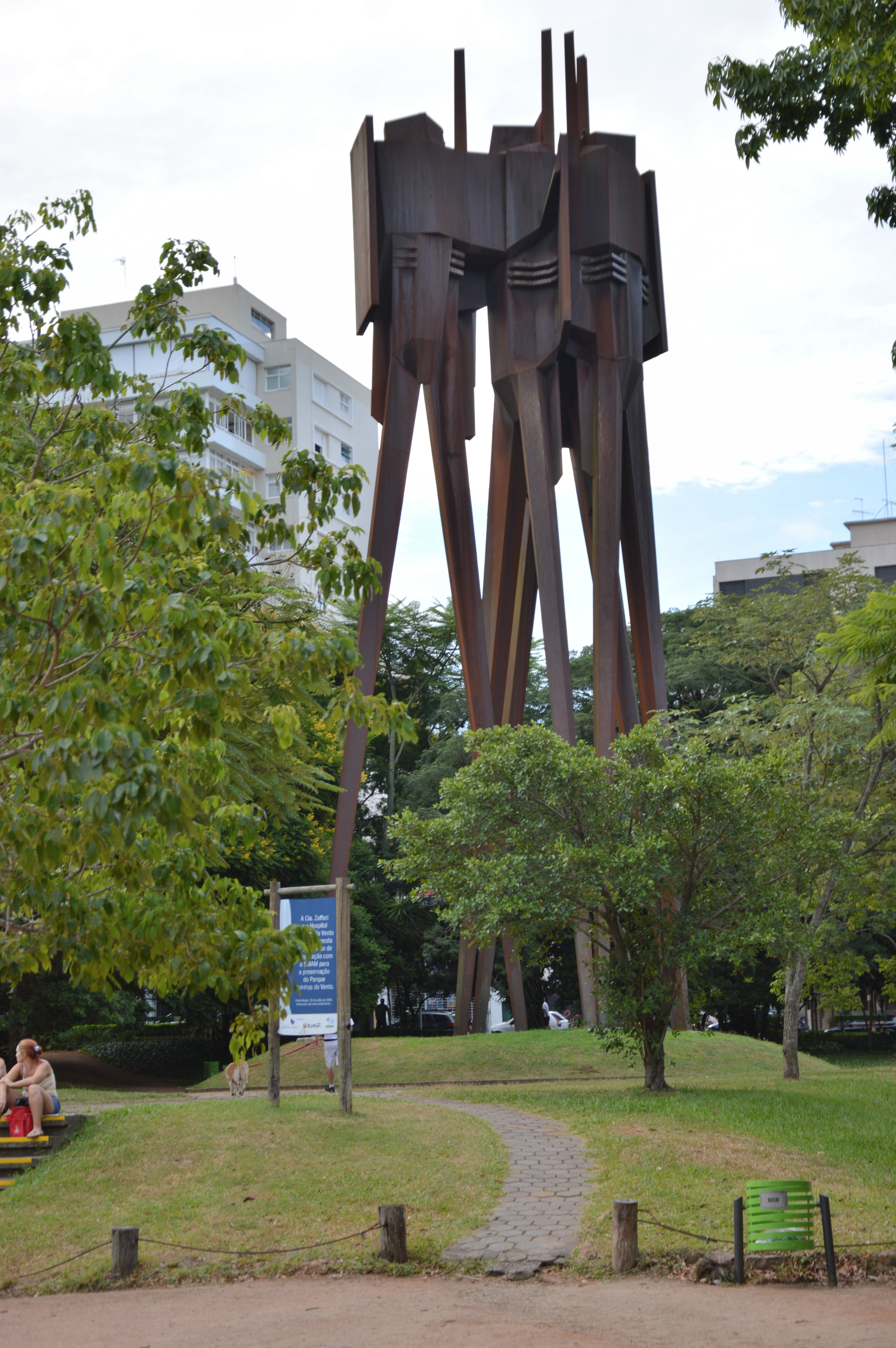 Monumento ao Presidente Humberto de Alencar Castelo Branco no Parque Moinhos de Vento em Porto Alegre. Escultura de Carlos Tenius.